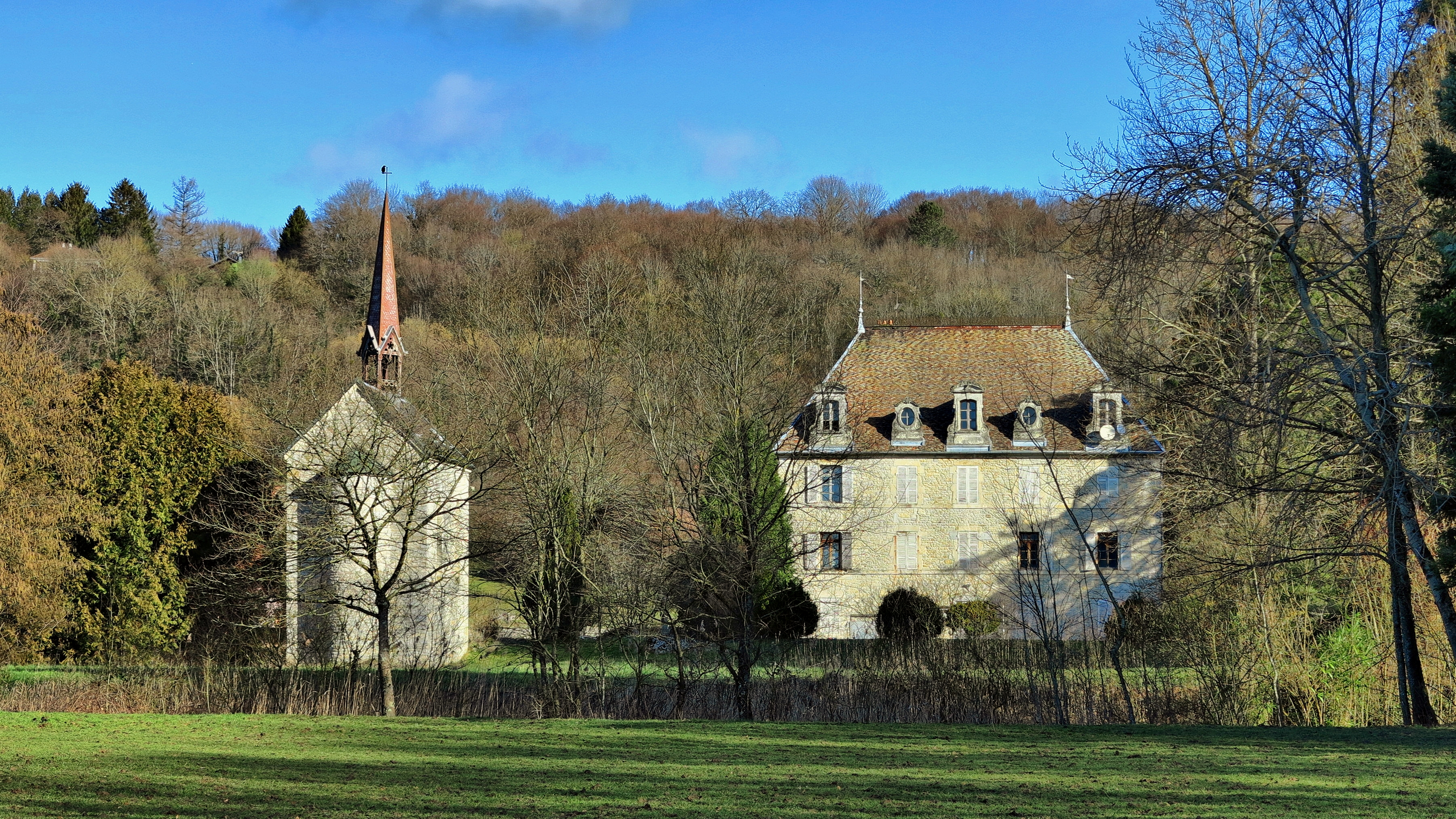 Le château de Roche et sa chapelle